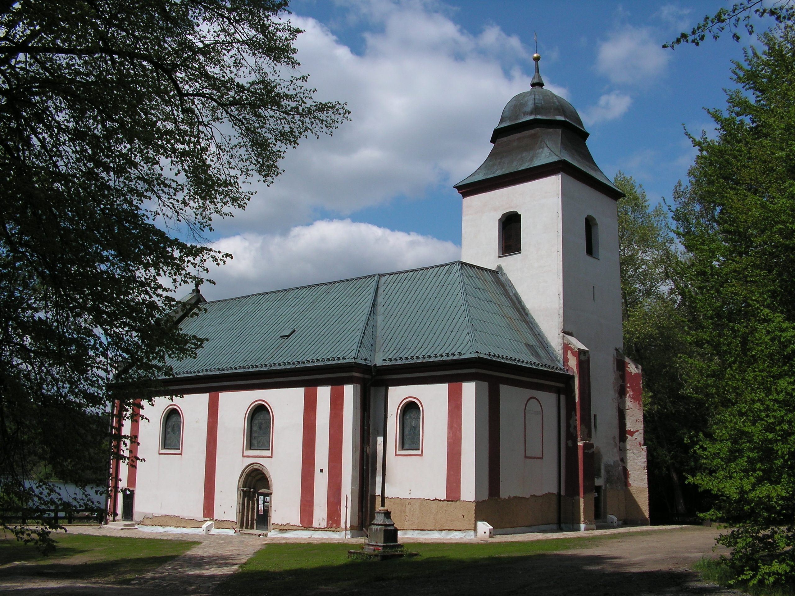 Kostel sv. Víta v Zahrádce v okrese Havlíčkův Brod